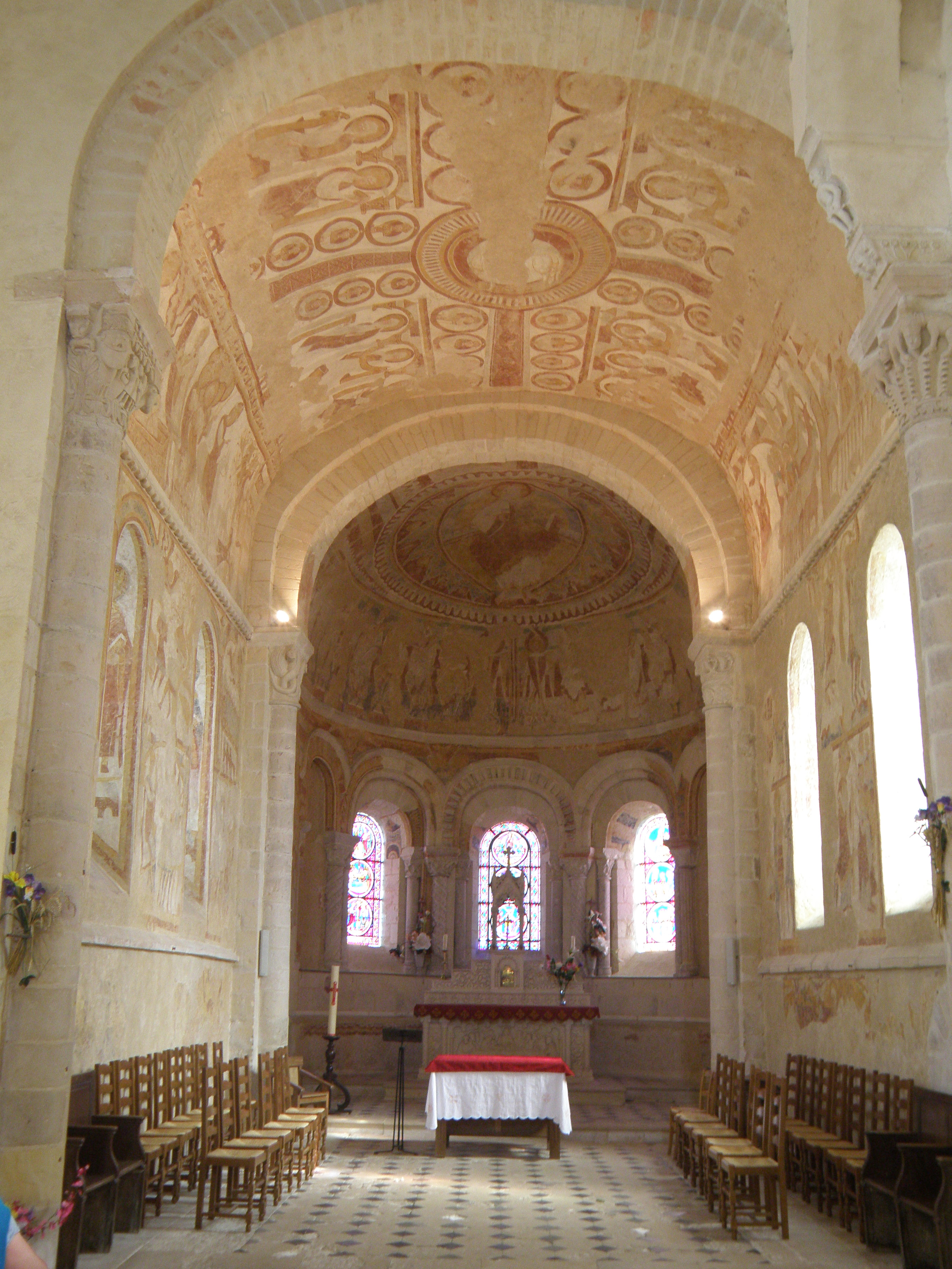 Intérieur de l'église de Chalivoy-Milon, avec aperçu des fresques